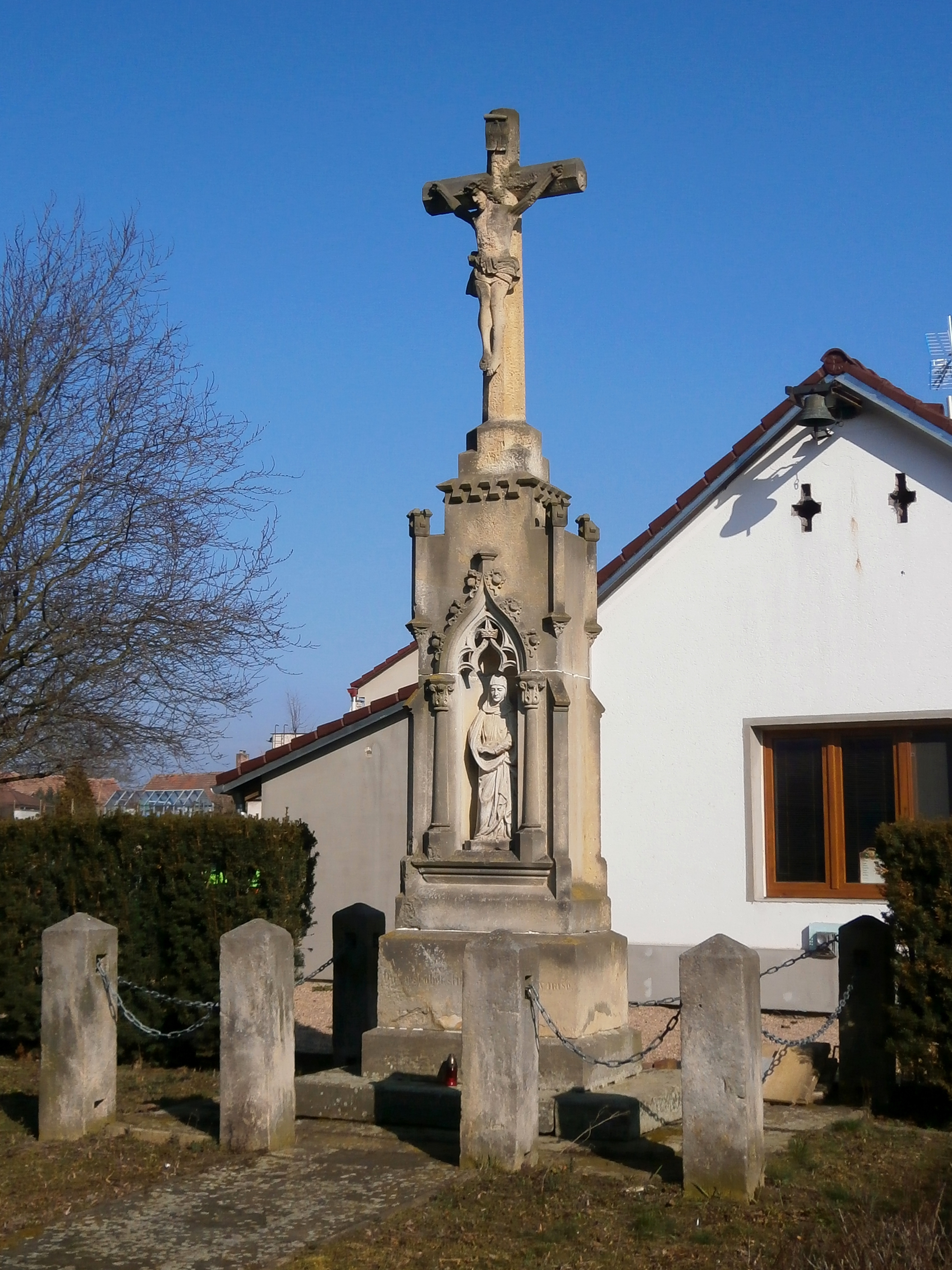 Kříž (Vlčkovice)